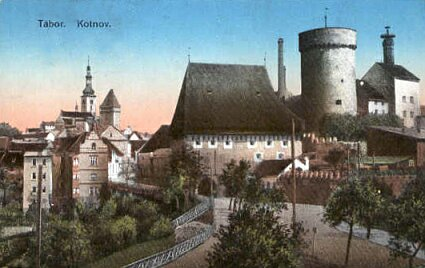 Dobová pohlednice z roku 1912 Tábor/věž hradu Kotnov s Bechyňskou branou